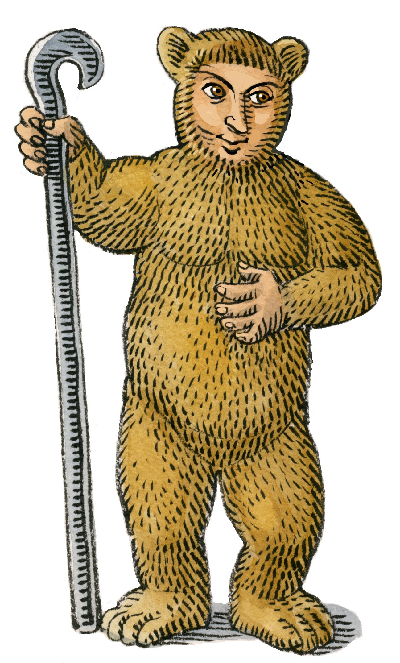 Jean de l'Ours, personnage du folklore européen